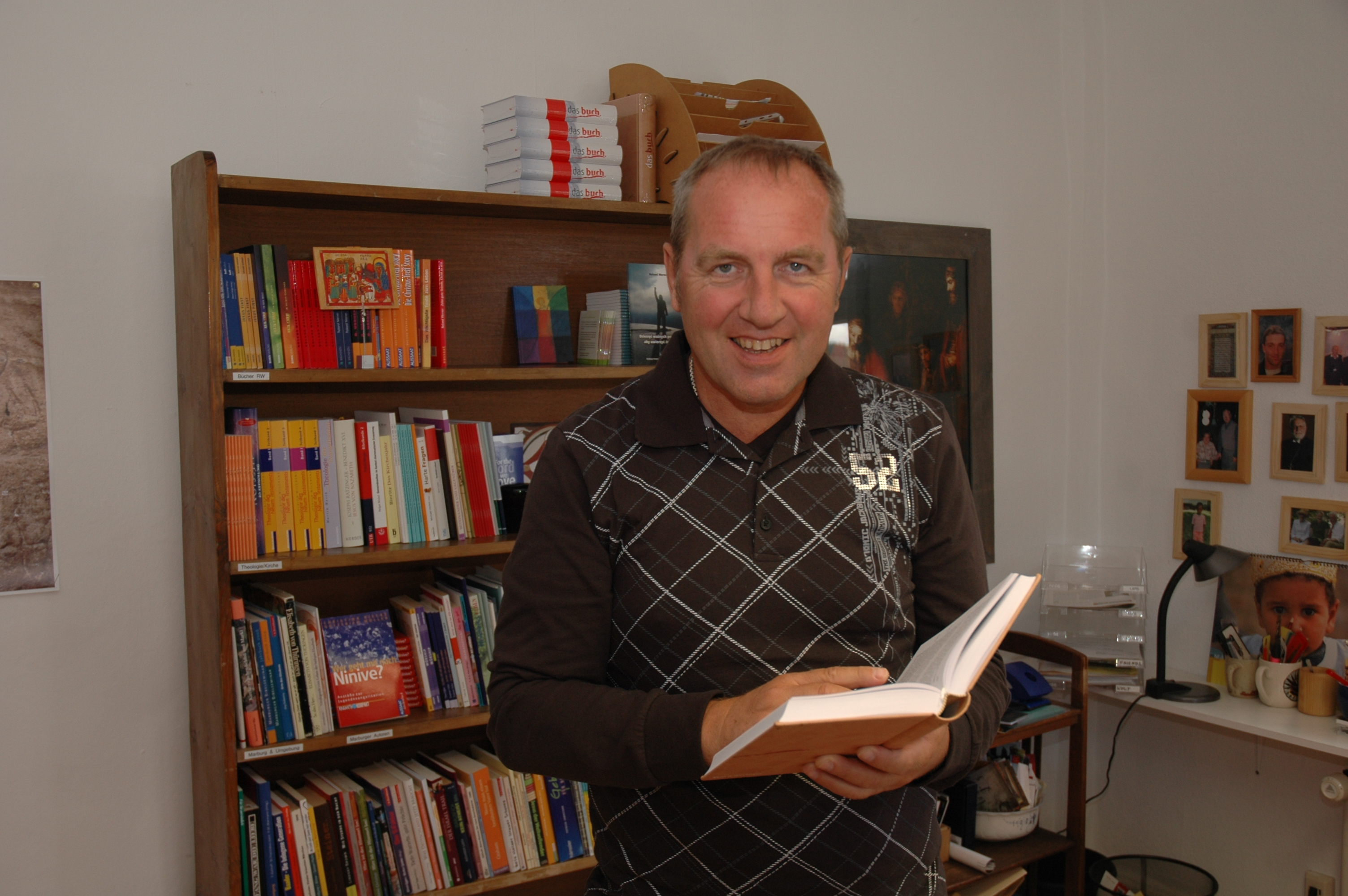 Roland Werner mit Bibelübersetzung das Buch. im Hintergrund, Foto von Medienmagazin pro